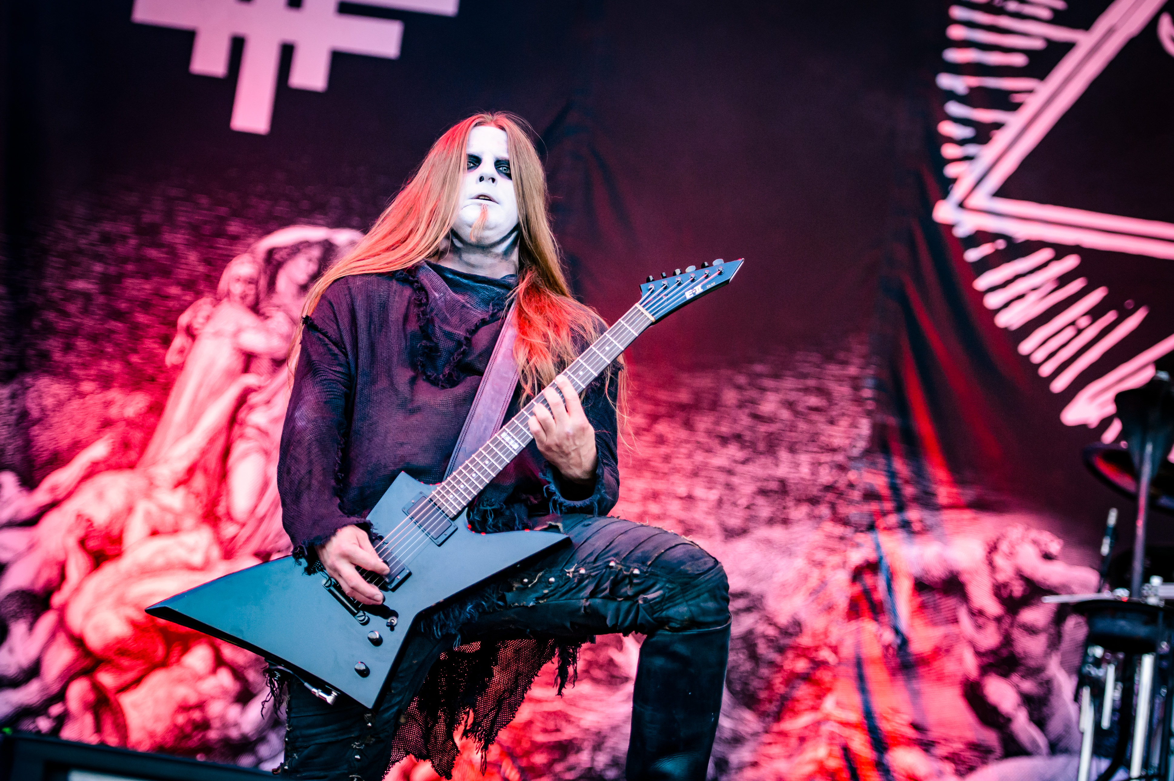 'Summer Breeze Festival 2018; Dinkelsbühl': 'Behemoth'